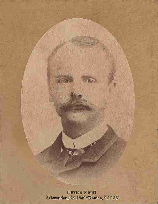 Enrico Zopfi (1849-1881) figlio di Gioachino e di Anna Maria Aebli